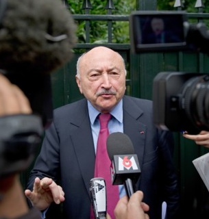 Georges Kiejman répond aux questions des journalistes